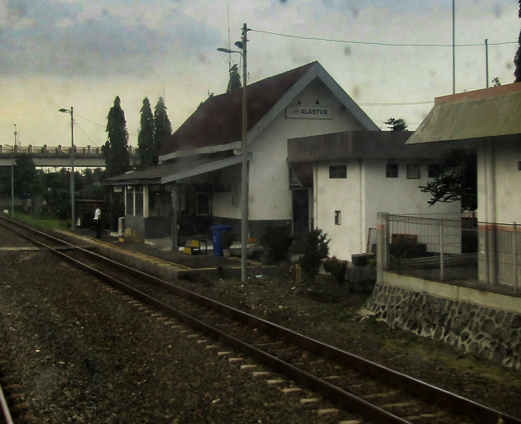 Tampak peron Stasiun Alastua, 2019